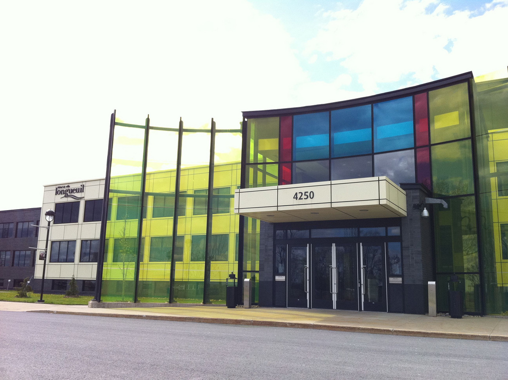 Ceci est l'Hôtel de ville officiel depuis la fusion des municipalités. Cet édifice est localisé à l'ouest de l'aéroport de St-Hubert.